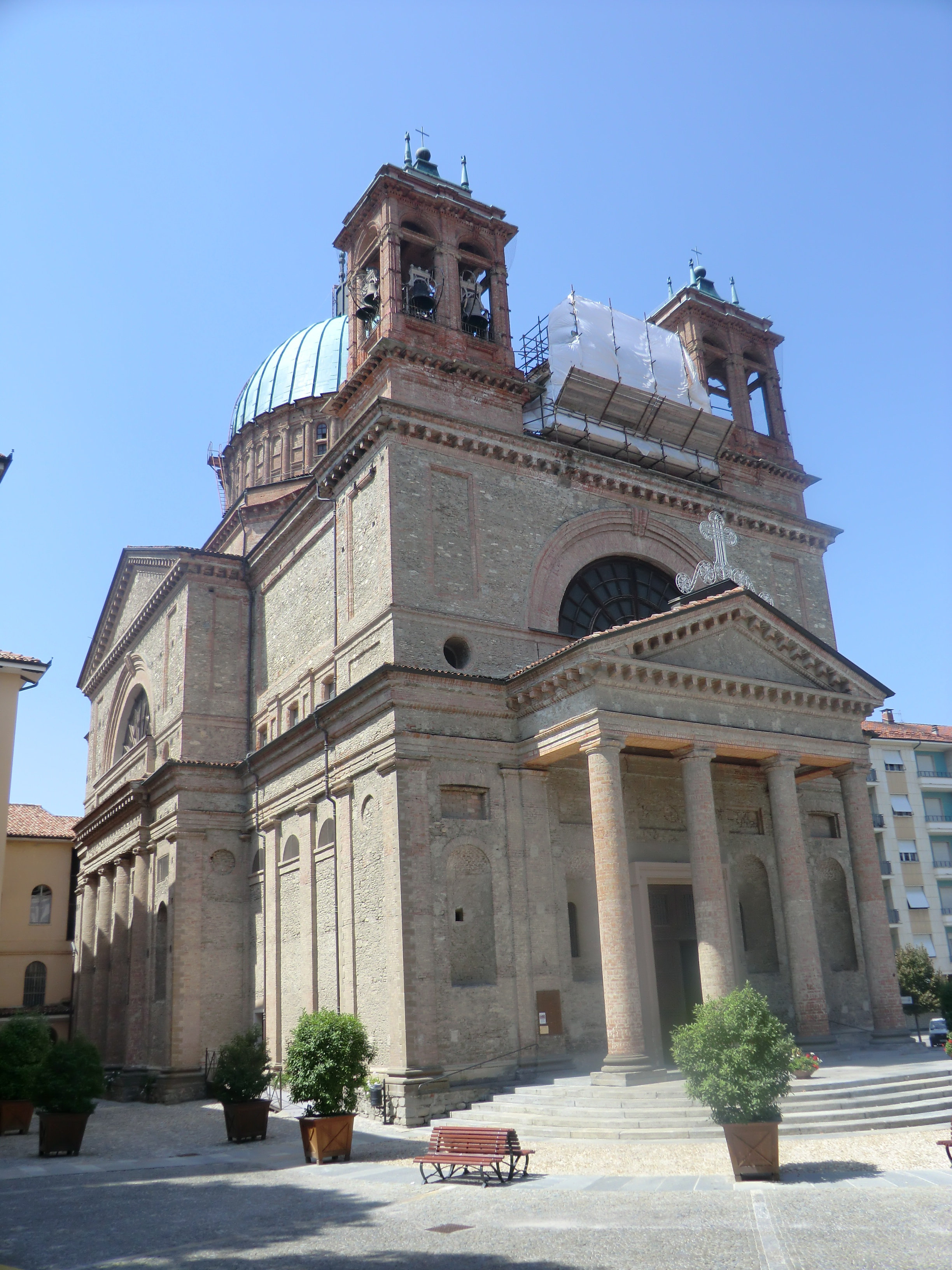 Dogliani: chiesa di San Quirico e Paolo (1870) - arch. G.B. Schellino